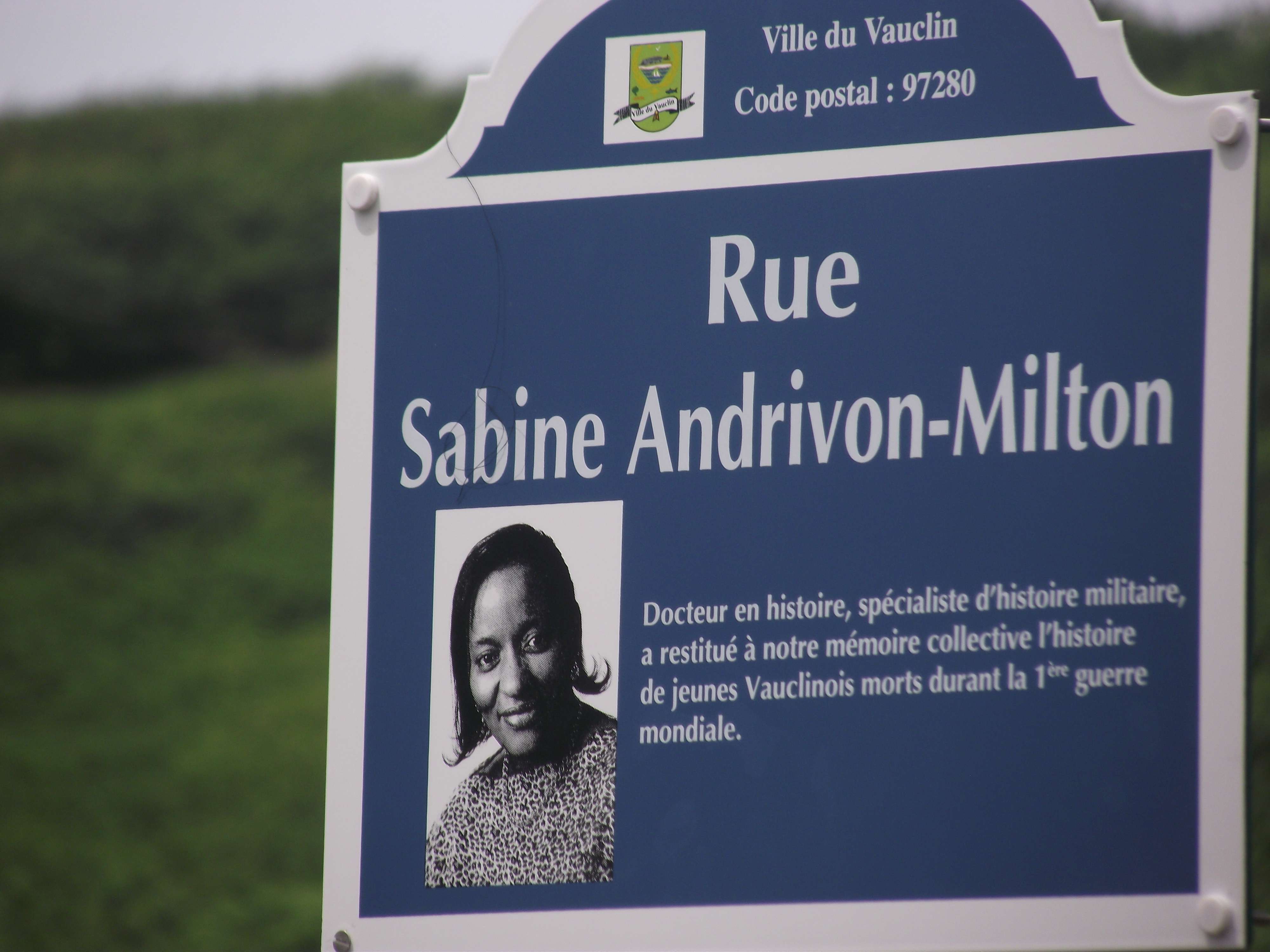 plaque de la rue Sabine Andruvon-Milton